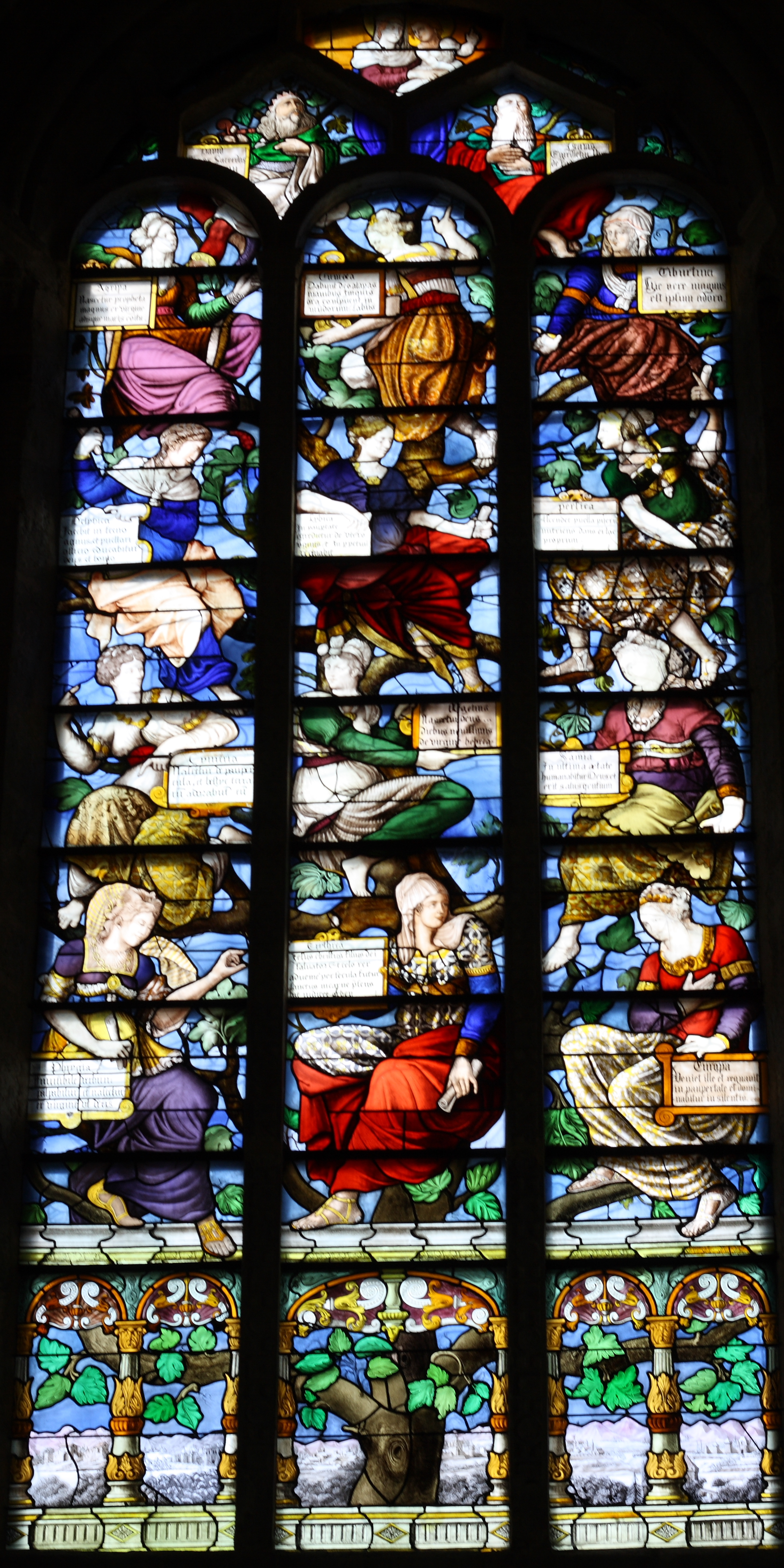 Bleiglasfenster Nr. 9 in der Kirche Notre-Dame-du-Fort in Étampes, Darstellung: "Arbre des sibylles"